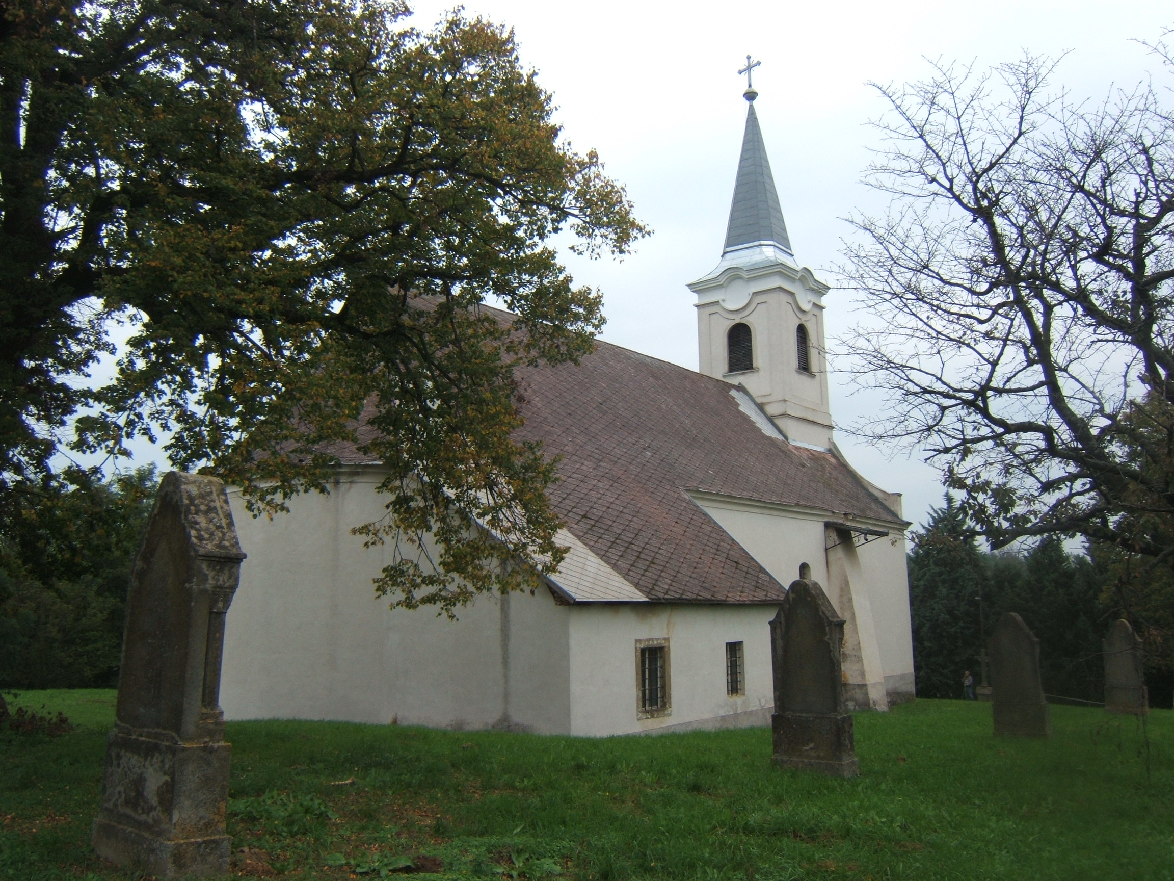 Helesfai templom